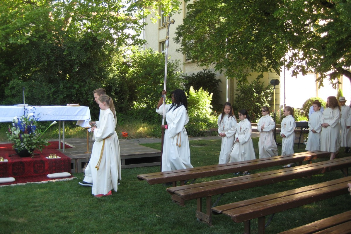 Fronleichnahms Gottesdienst auf dem Schulhausplatz in Grenchen.